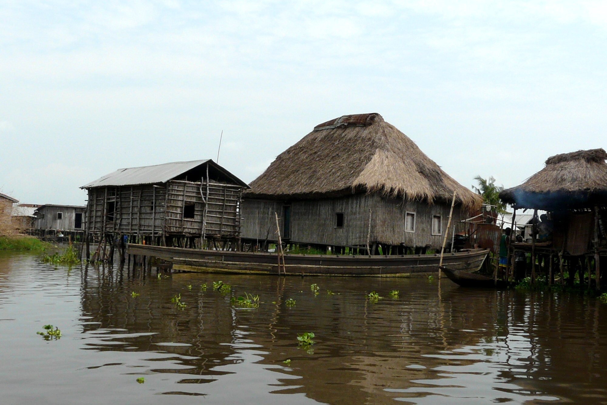 Ganvié (la Venise africaine) Bénin en novembre 2008 par BRUNNER Emmanuel (manu25)